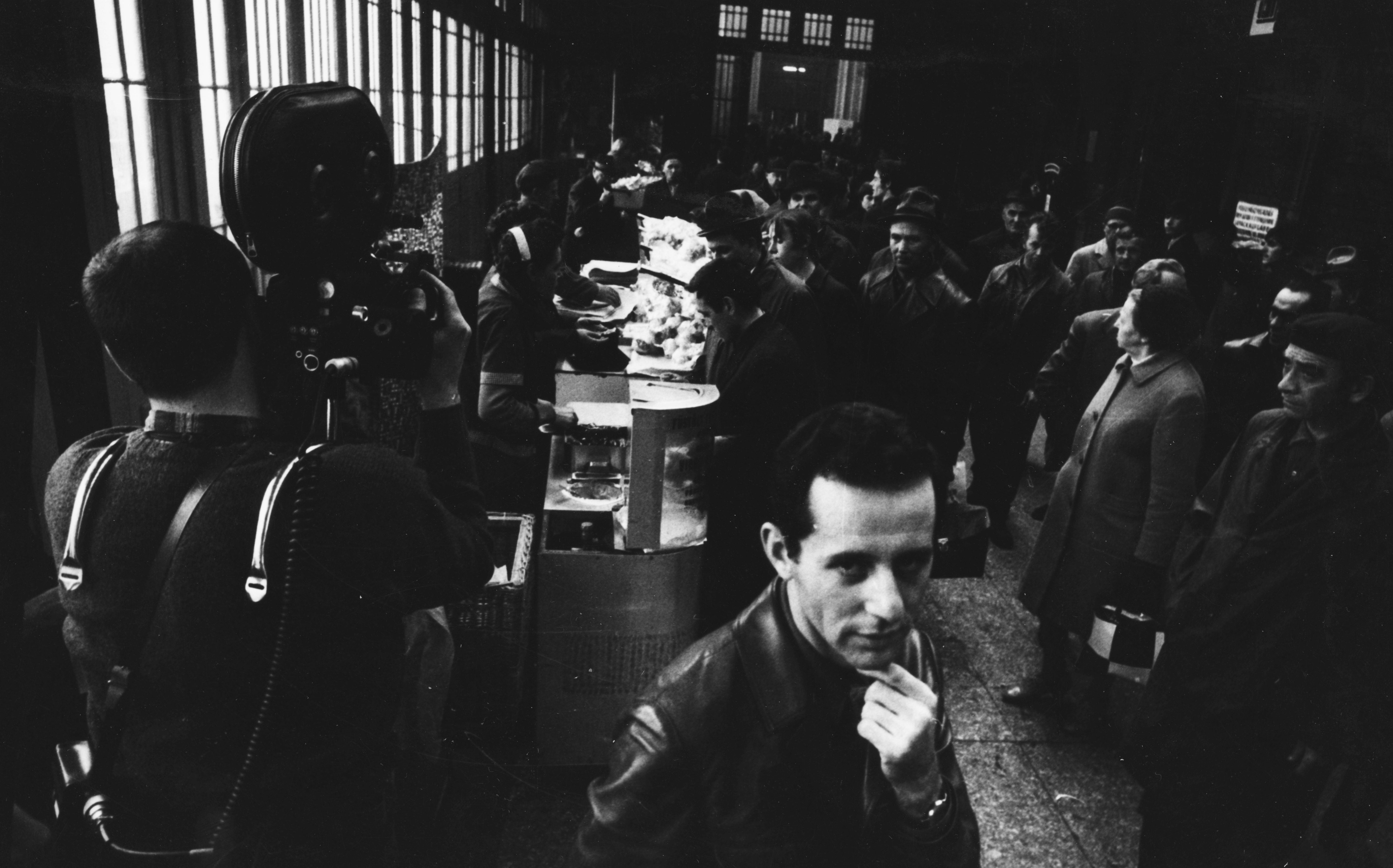 Nyugati pályaudvar, indulási oldal, váróterem, elöl középen Schiffer Pál filmrendező.